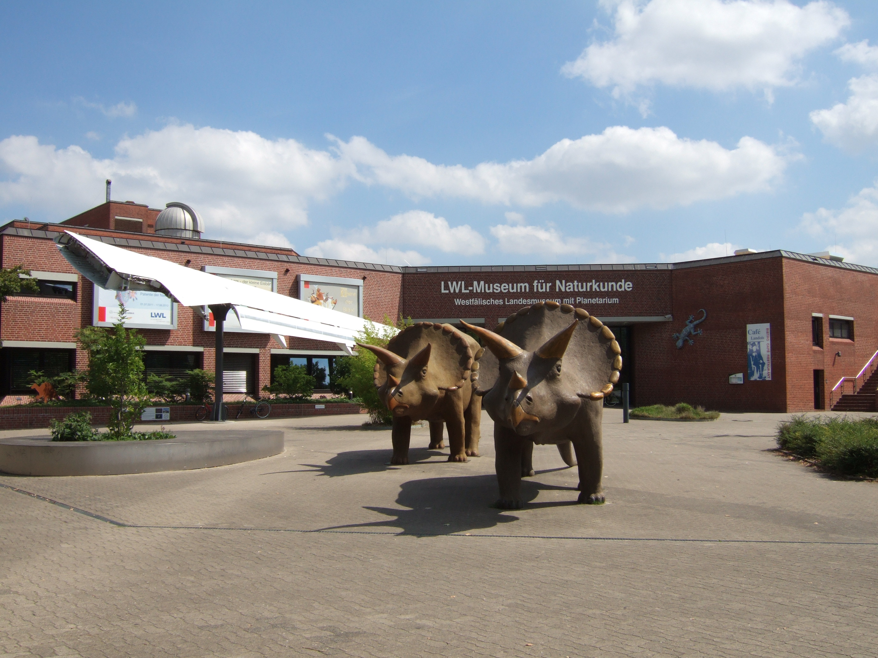 Der Eingang LWL-Museum für Naturkunde gegenüber dem Zoo.